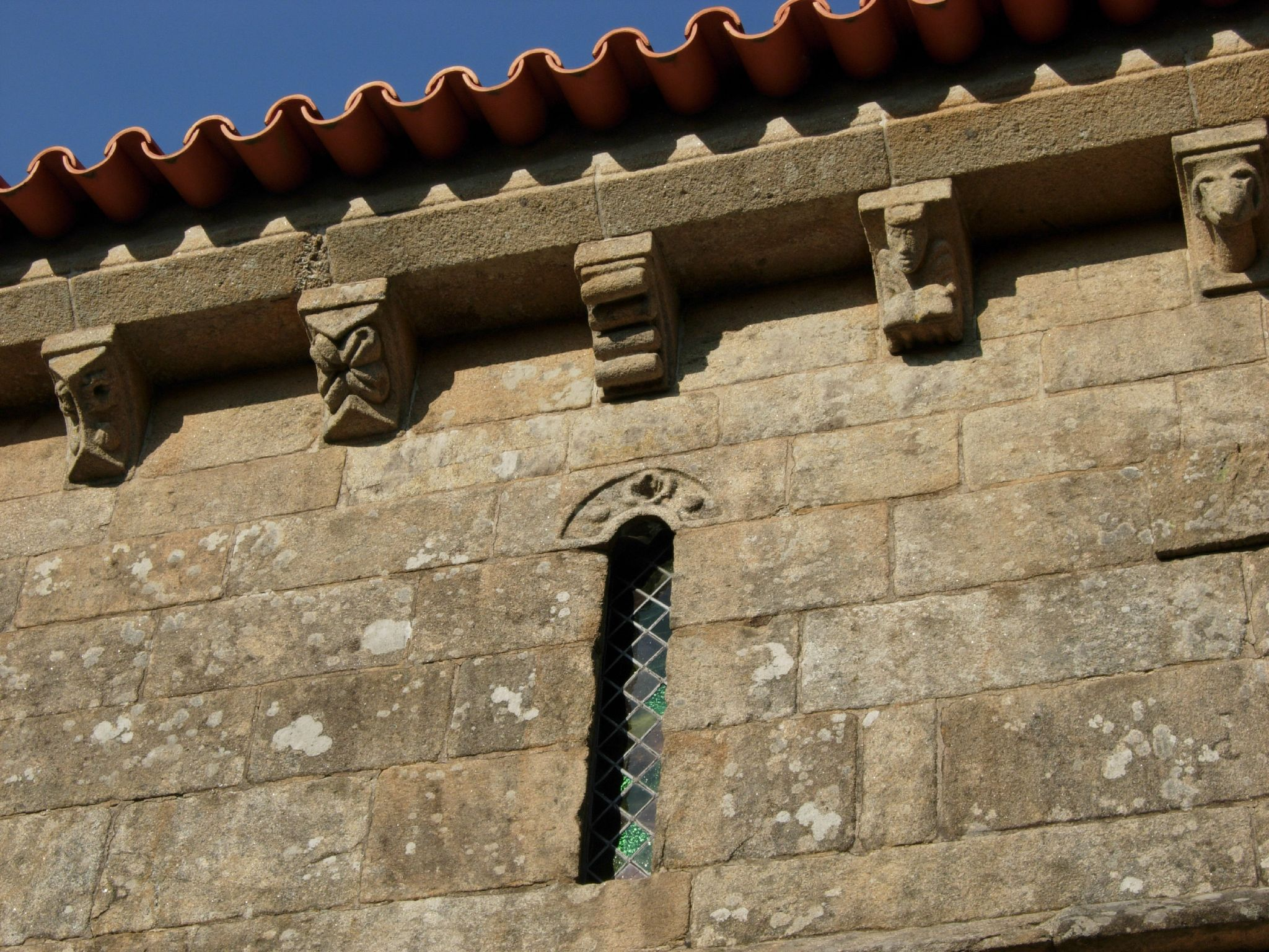 Canecillos en la cornisa del muro sur. Debajo de ellos se abre una aspillera con arco de medio punto sencillamente decorado.